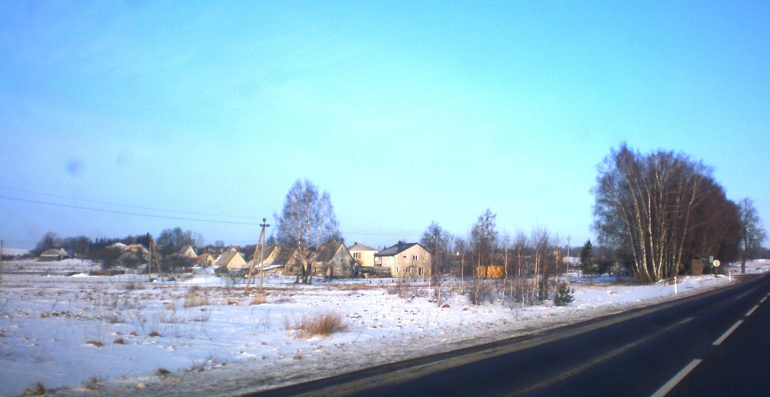 Ragožiai, Jonavos raj.